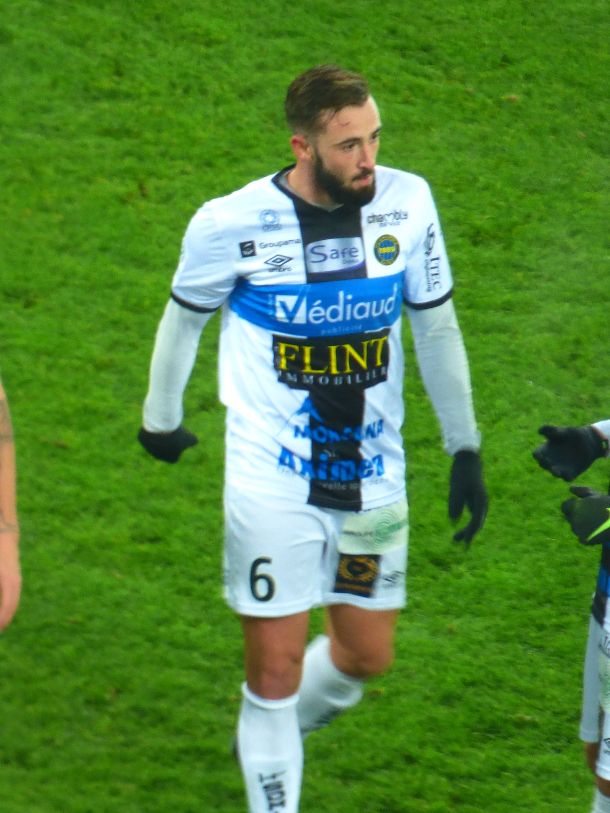 Joachim Eickmayer lors du match Lens - Chambly, comptant pour la dix-septième journée du championnat de France de football de Ligue 2 2019-2020, le 3 décembre 2019.